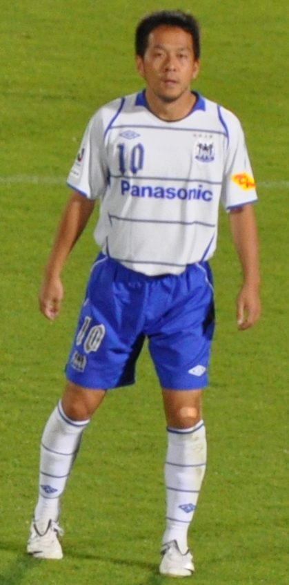 Takahiro Futagawa, cropped from Kawasaki Frontale vs Gamba Osaka_278